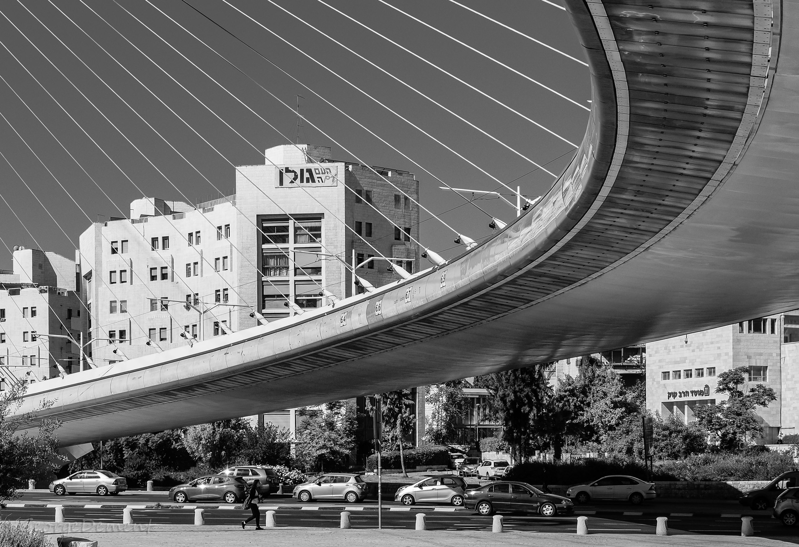 Calatrava Bridge in Jerusalem Jerusalem